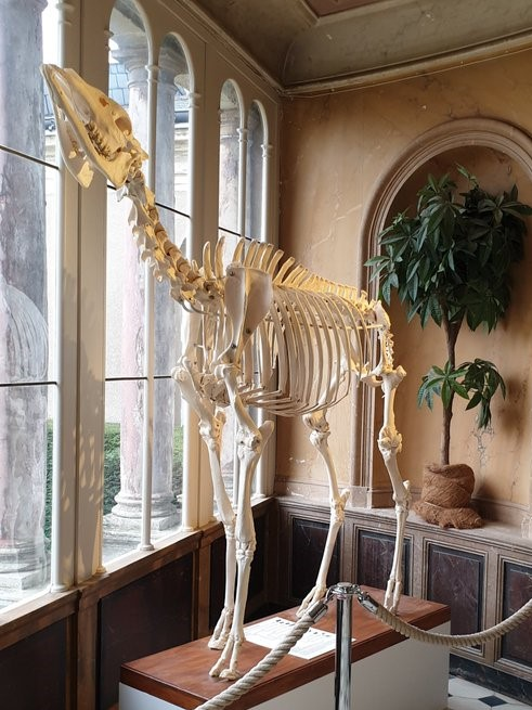 OKapi